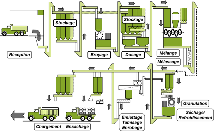 yyiy